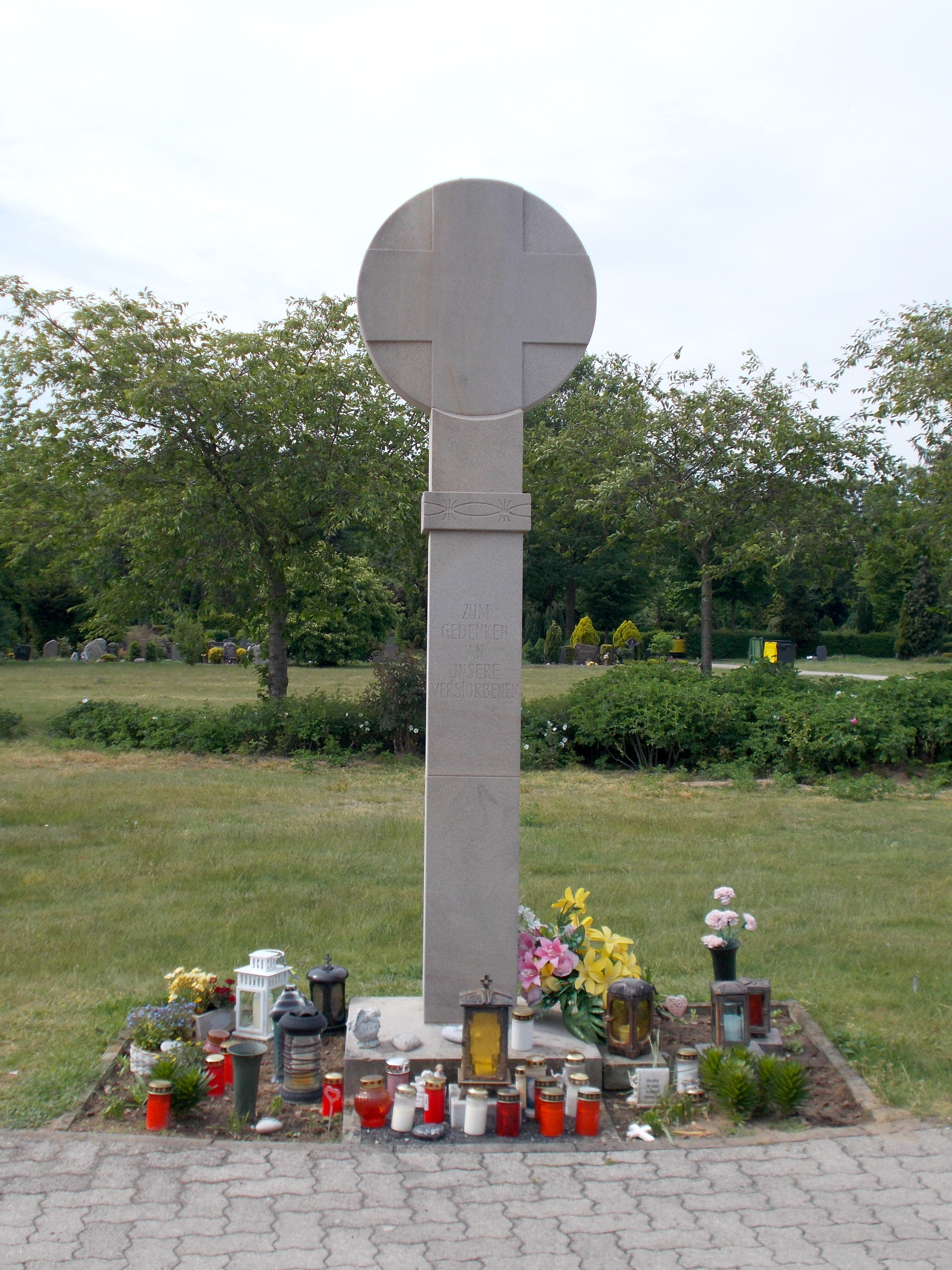 Gedenkkreuz auf dem neuen Teil des Friedhof Annaberg.